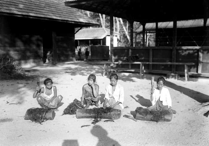 Negatief. Gevangenen kloppen kokosnootbolsters in de gevangenis van Lubu Pakam aan de Oostkust van Sumatra